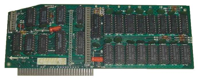 Placa de expansão de memória TK WORKS com 512kB